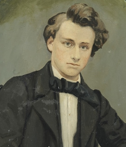 Portrett av Bernhard Cathrinus Paus (1839–1907) Inventarnr. OMu.k00039 Signatur: E.E. 1916 Eier: Oslo Museum